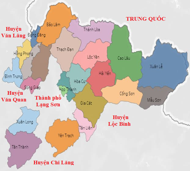 các xã thuộc huyện Cao Lộc